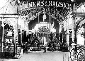 Messestand der Siemens & Halske auf der Internationalen Elektrotechnischen Ausstellung 1891 in Frankfurt am Main